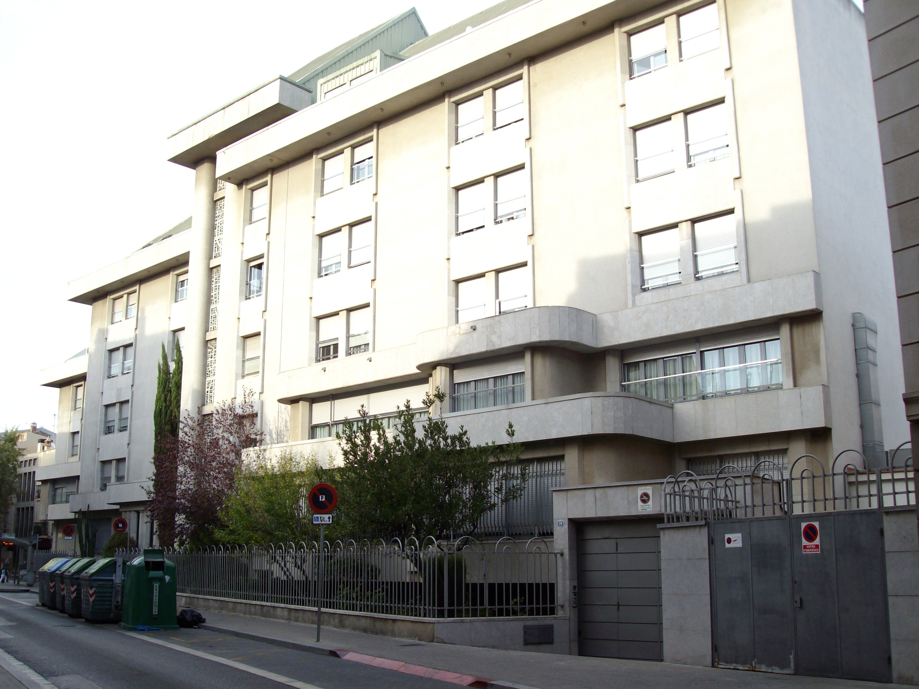 Aspecto actual de la casa pairal del Dr. Félix Sardá y Salvany, sacerdote, apologista y escritor sabadellense, representante destacado del integrismo católico de la Restauración. En 1905 convirtió dicha casa familiar en un asilo de ancianos de las Hermanitas de los Ancianos Desamparados. La casa fue construida a mediados del siglo XIX, siendo reformada en los años 20 por Josep Renom i Costa, posteriormente, en 1985, fue totalmente transformada y ampliada. En la actualidad es la residencia de ancianos "Sardà i Salvany". Está situada en la calle Sant Joan, 9, de Sabadell, Barcelona (España).